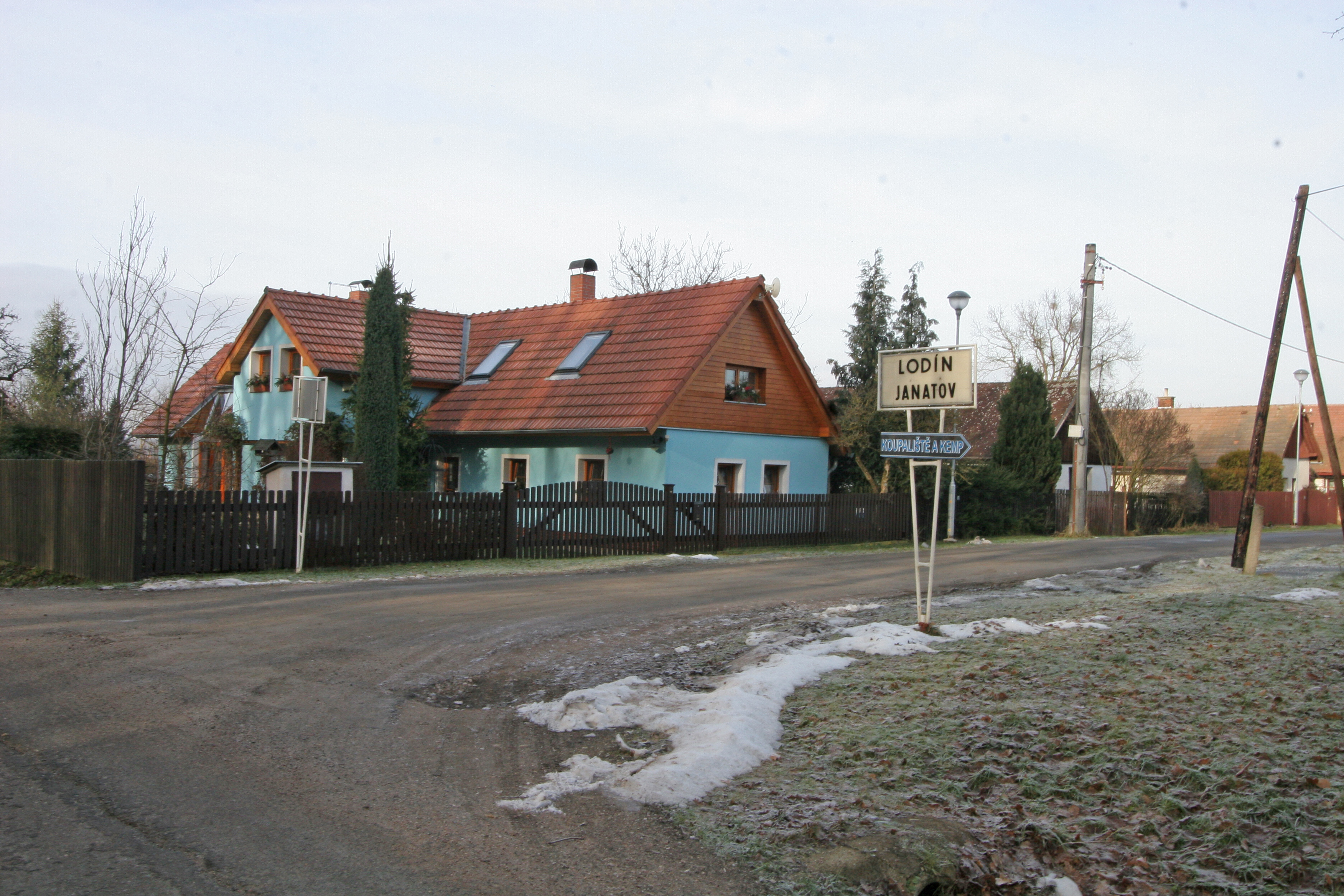 Janatov čp. 26